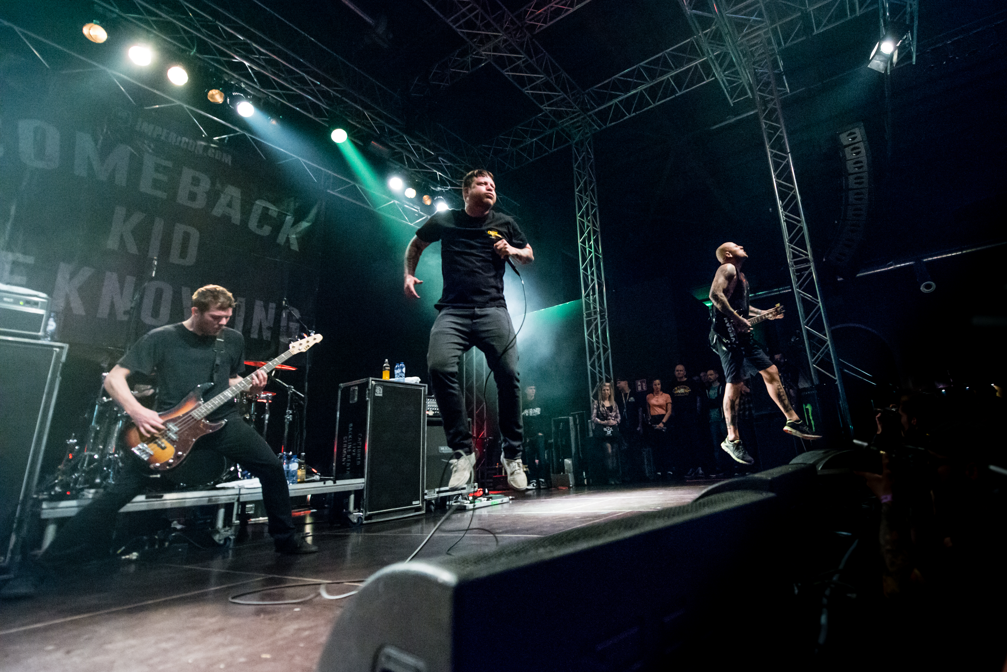 'Impericon Festival 2015; Oberhausen Turbinenhalle': 'Comeback Kid'